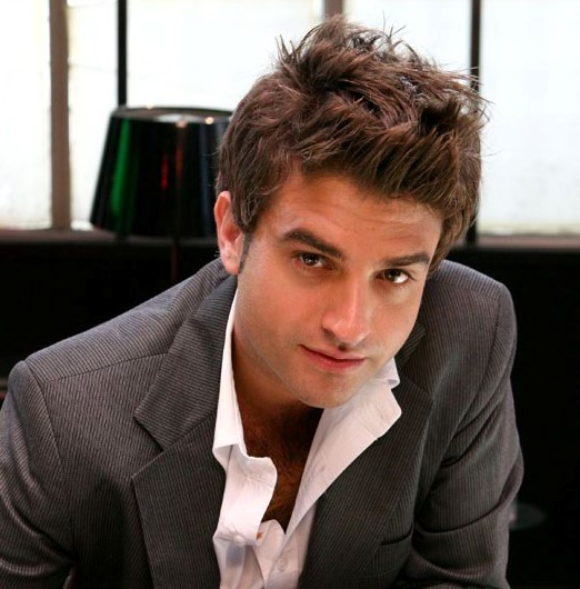 ליאור רוכמן